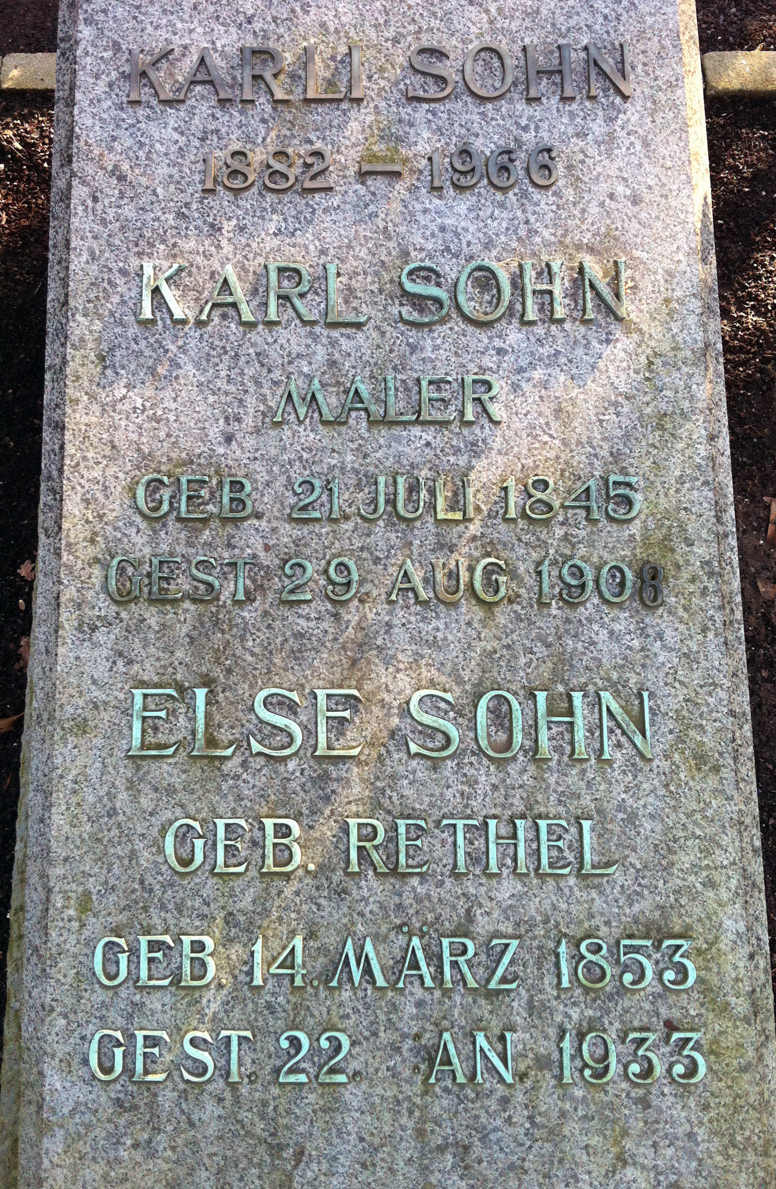 Grabstein Karl Rudolf Sohn † 1908, seiner Frau Else, geborene Rethel † 1933, Karli Sohn-Rethel † 1966, Nordfriedhof Düsseldorf, Feld 70